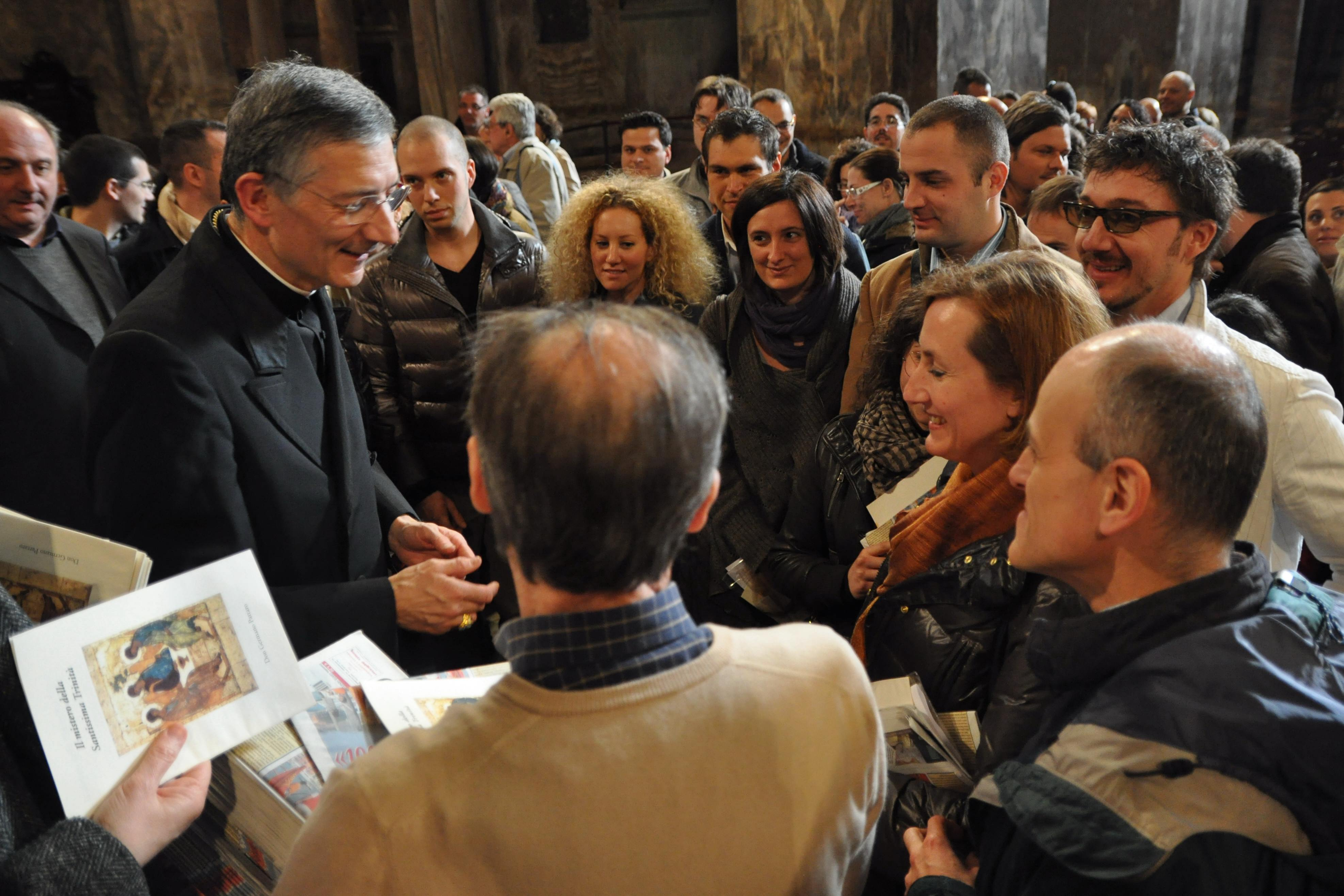 Basilica di San Marco, 1-4-2012, il Patriarca Francesco, incontra i fidanzati e i giovani sposi.